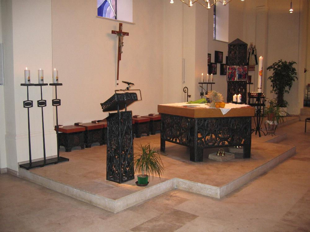 D'Altorinsel an der Bieles Kierch. Photo vum --Pear 12:16, 4 September 2006 (UTC) 03.09.2006. Bieles Kategorie:Gemeng Suessem